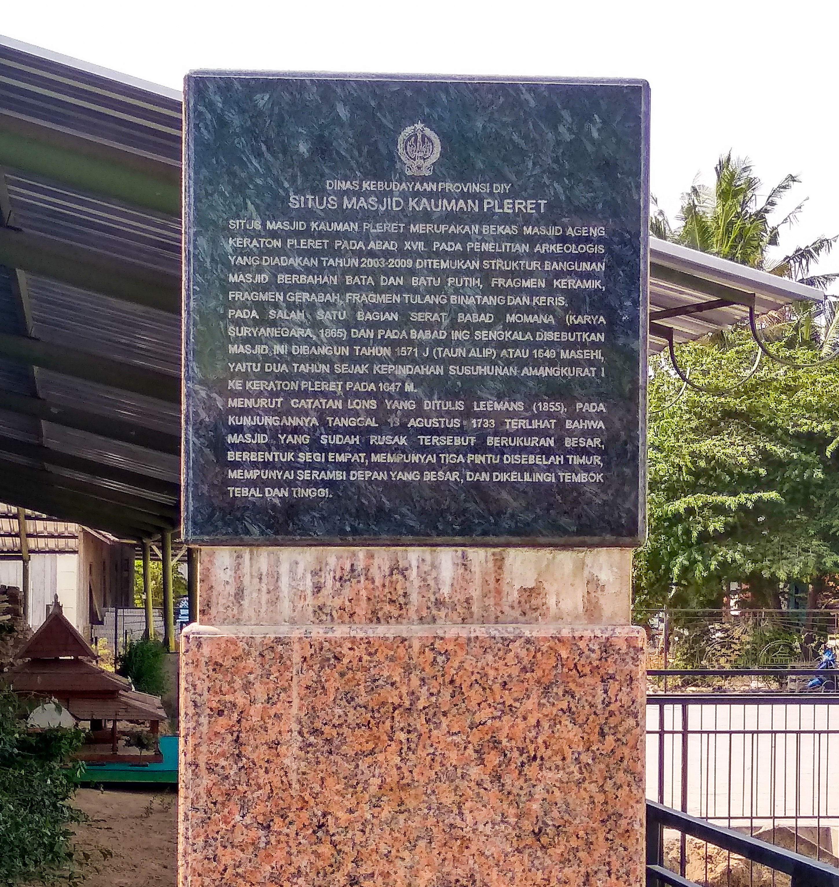 Informasi dasar yang ada di tugu informasi Situs Masjid Kauman Pleret.